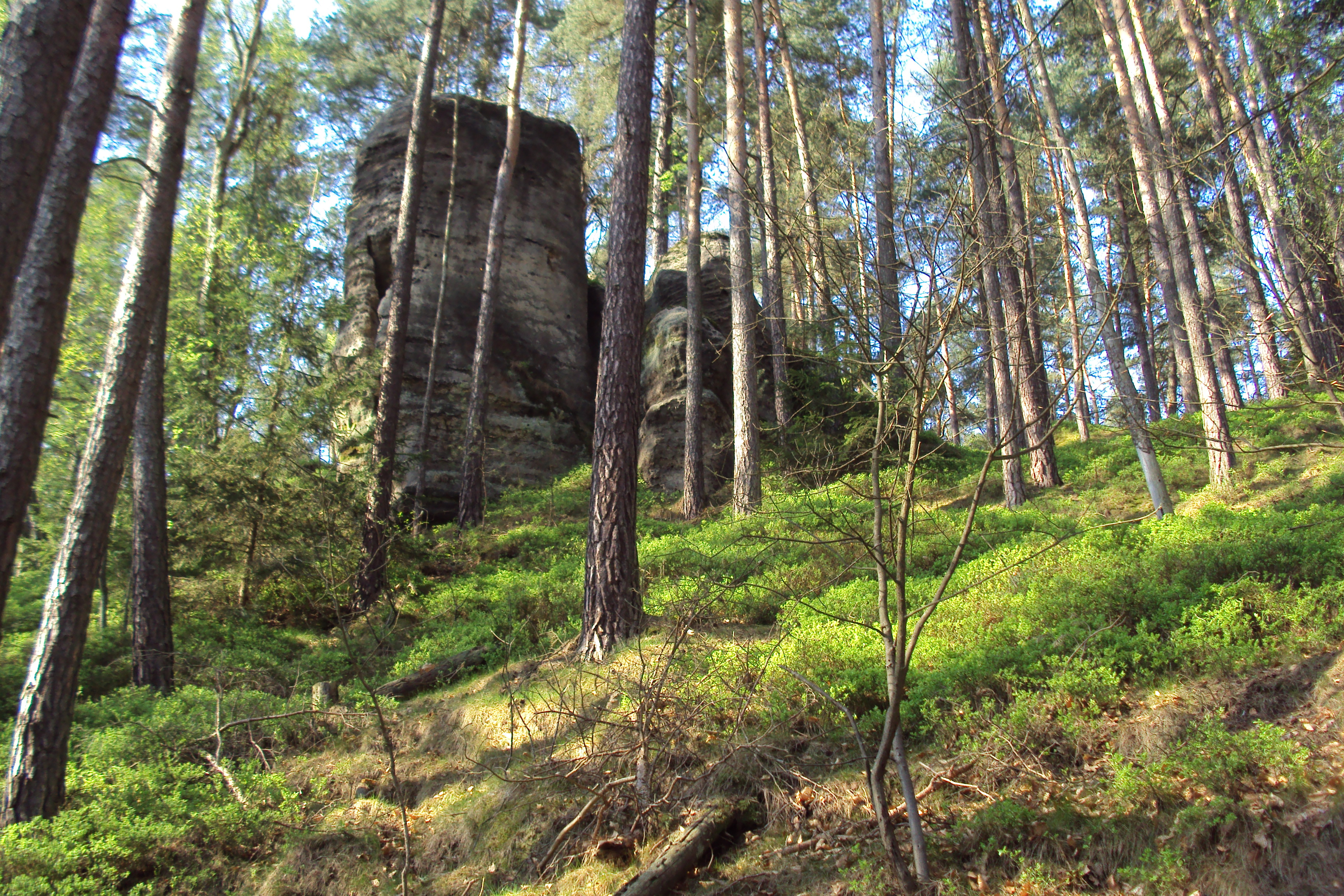 Zaniklá tvrz Pancířů ze Smojna ve Velenicích